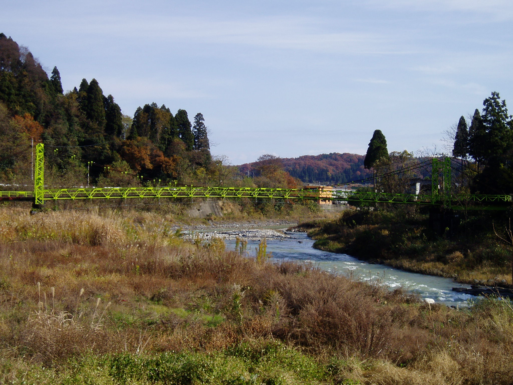 井田川に架かるつり橋に山吹橋